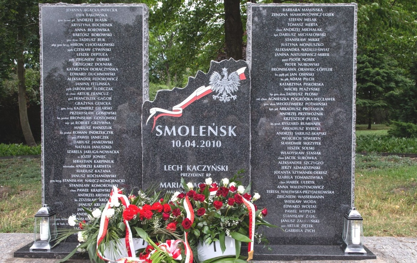 Stargard. Pomnik Smoleńsk 10.04.2010